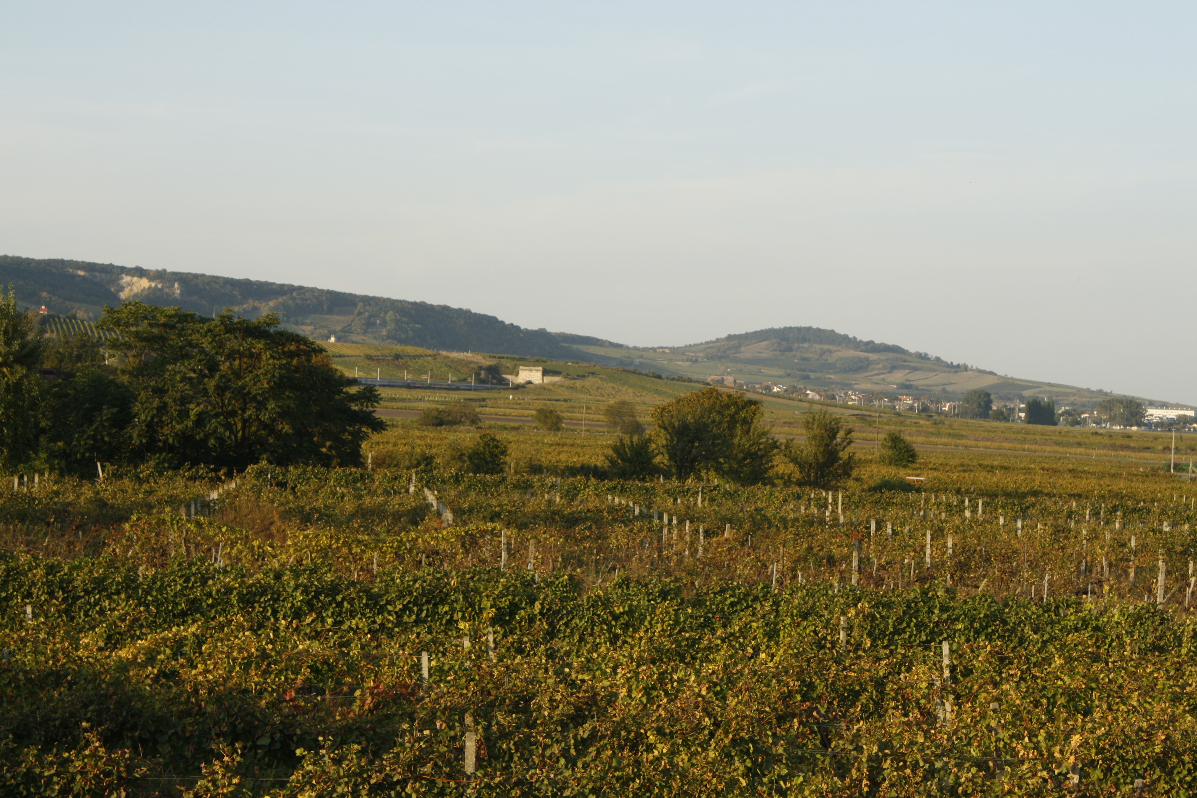 Eichkogel bei Mödling von Pfaffstätten aus. In der Mitte das Tunnelportal des Busserltunnel der Südbahn